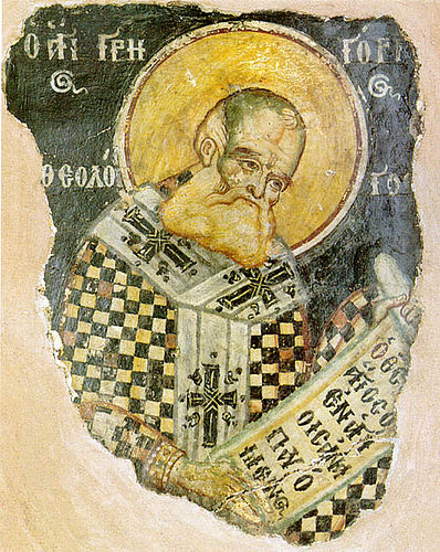 Gregory of Nazianzus. Григорий Богослов